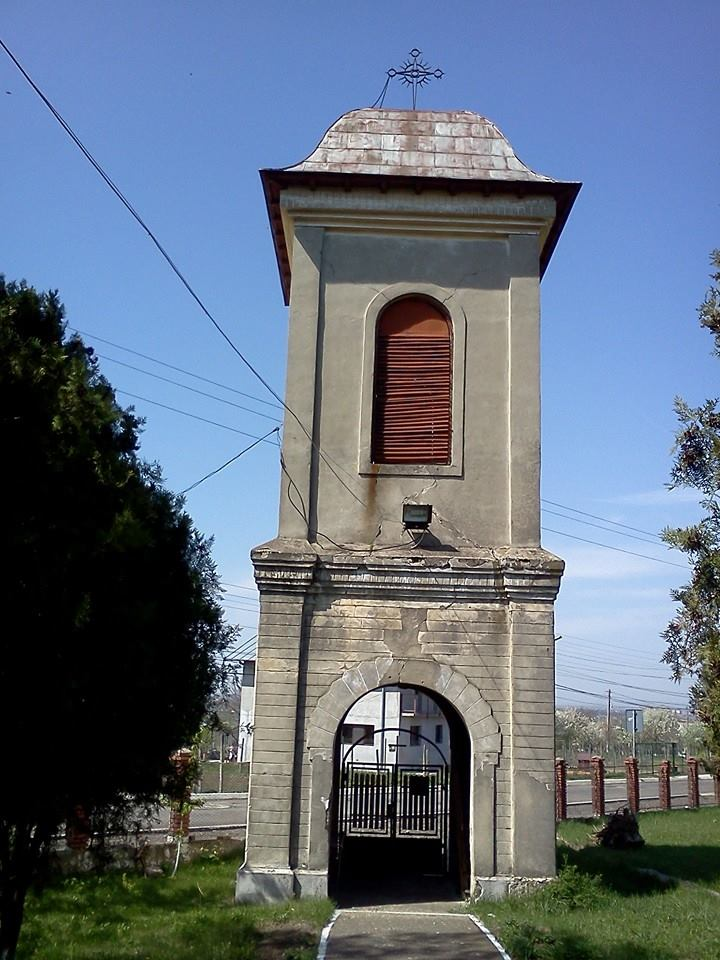 Turn clopotniță 02